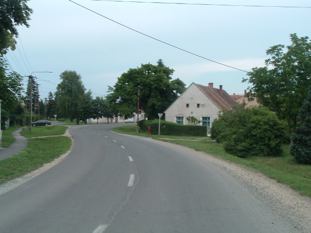 Street in Söpte, Hungary